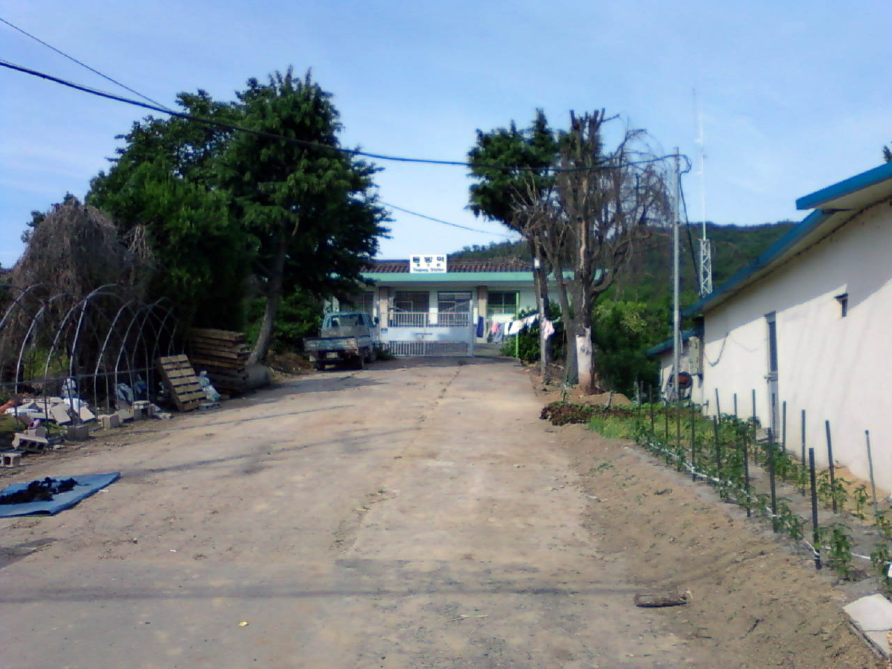 경상북도 동방역 역사